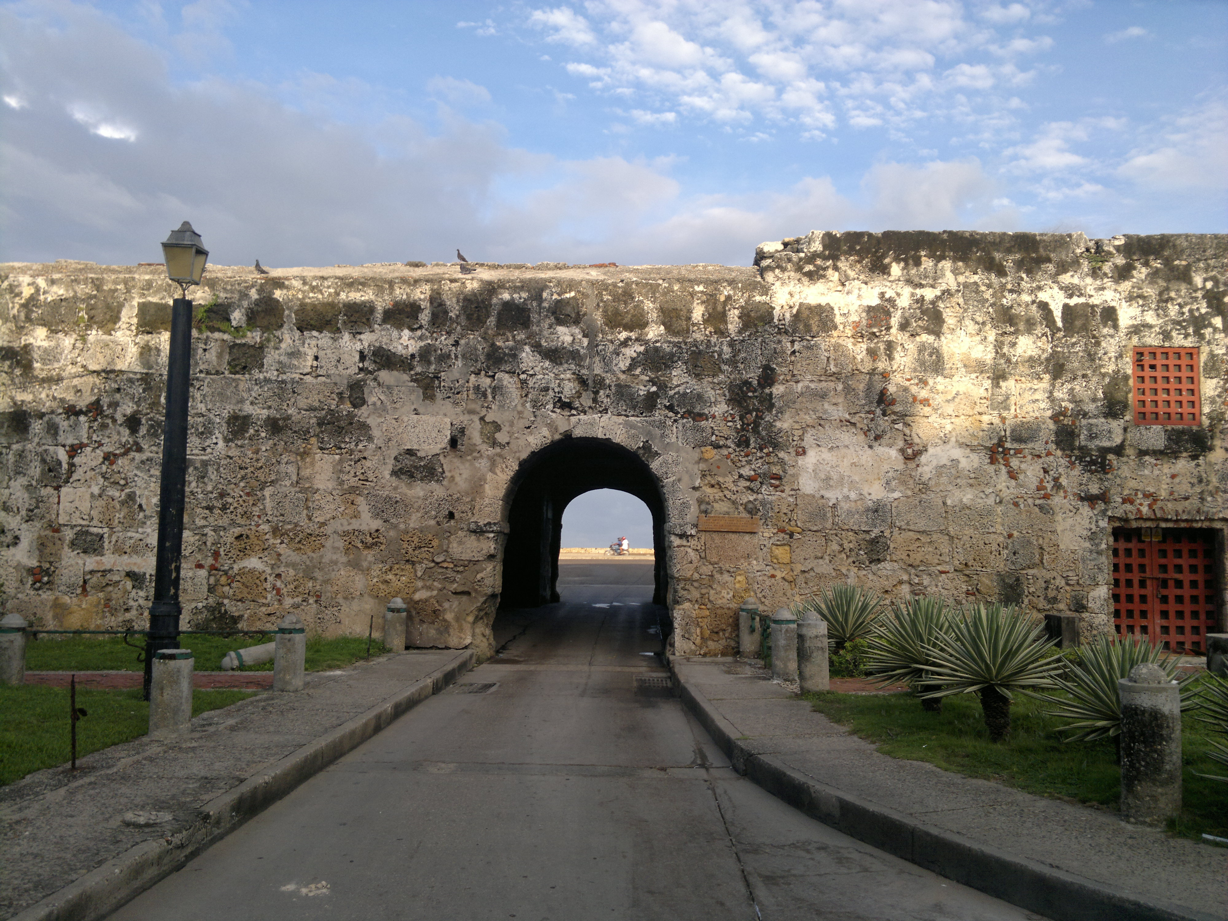 Cortina entre los baluartes de Santiago y Santo Domingo